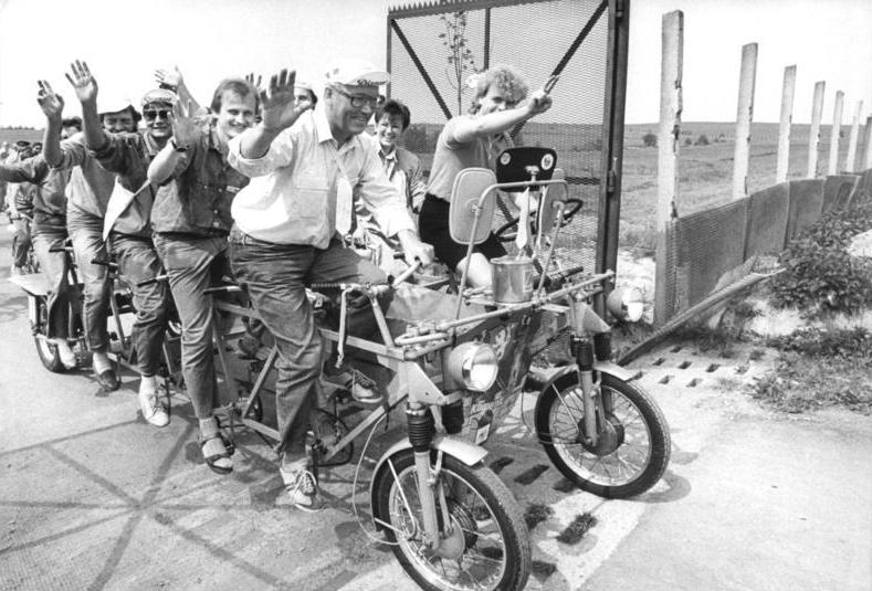 ADN-Kasper-31.5.90 Bez. Gera: Von Sachsen nach Oberfranken führt der Weg dieser Radler aus Kemenz mit ihrem originellen Gefährt. Zwischen Nentschau und Posseck passieren sie bei Oelsnitz die Grenze. Hier wurde der erste deutsch-deutsche Radfernwanderweg eröffnet, der von Bayreuth nach Chemnitz führt.